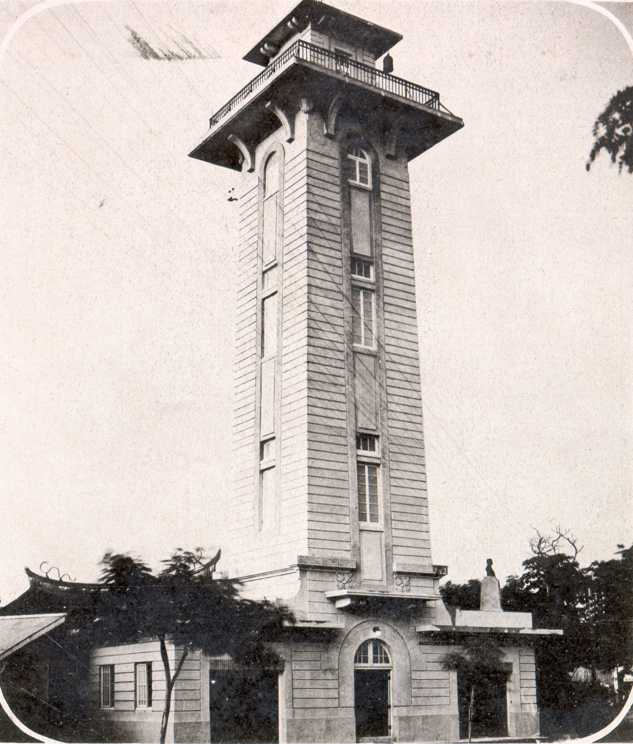 臺南御大典紀念塔為1930年為慶祝昭和天皇登基而興建，一旁有住吉秀松的雕像。塔的兩側在1937年增建為臺南合同廳舍。